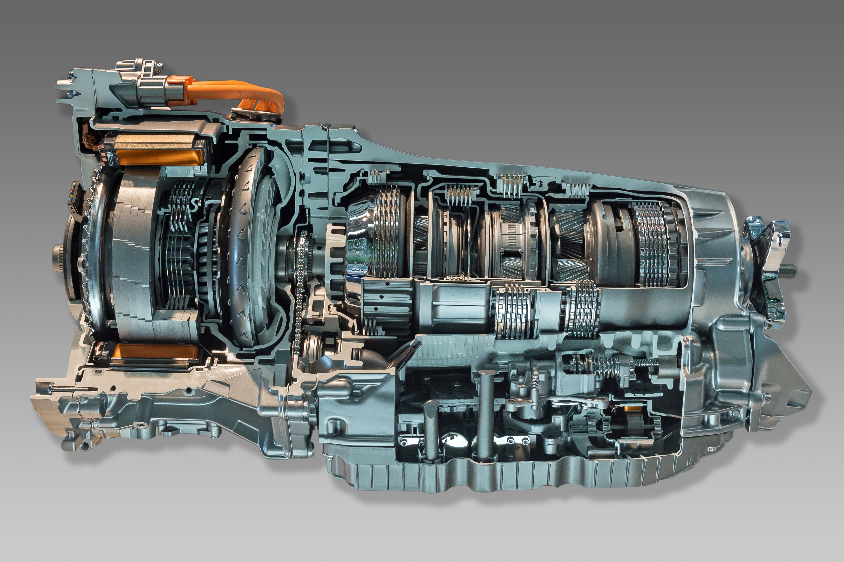 Schnittmodell eines Wandler-Automatikgetriebes Mercedes-Benz 9G-TRONIC mit Hybridantriebs-Komponenten, ausgestellt im Mercedes-Benz-Museum in Bad Cannstatt.